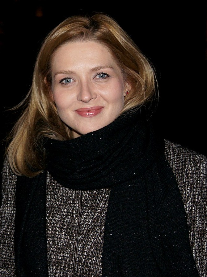 Grabowska Urszula.